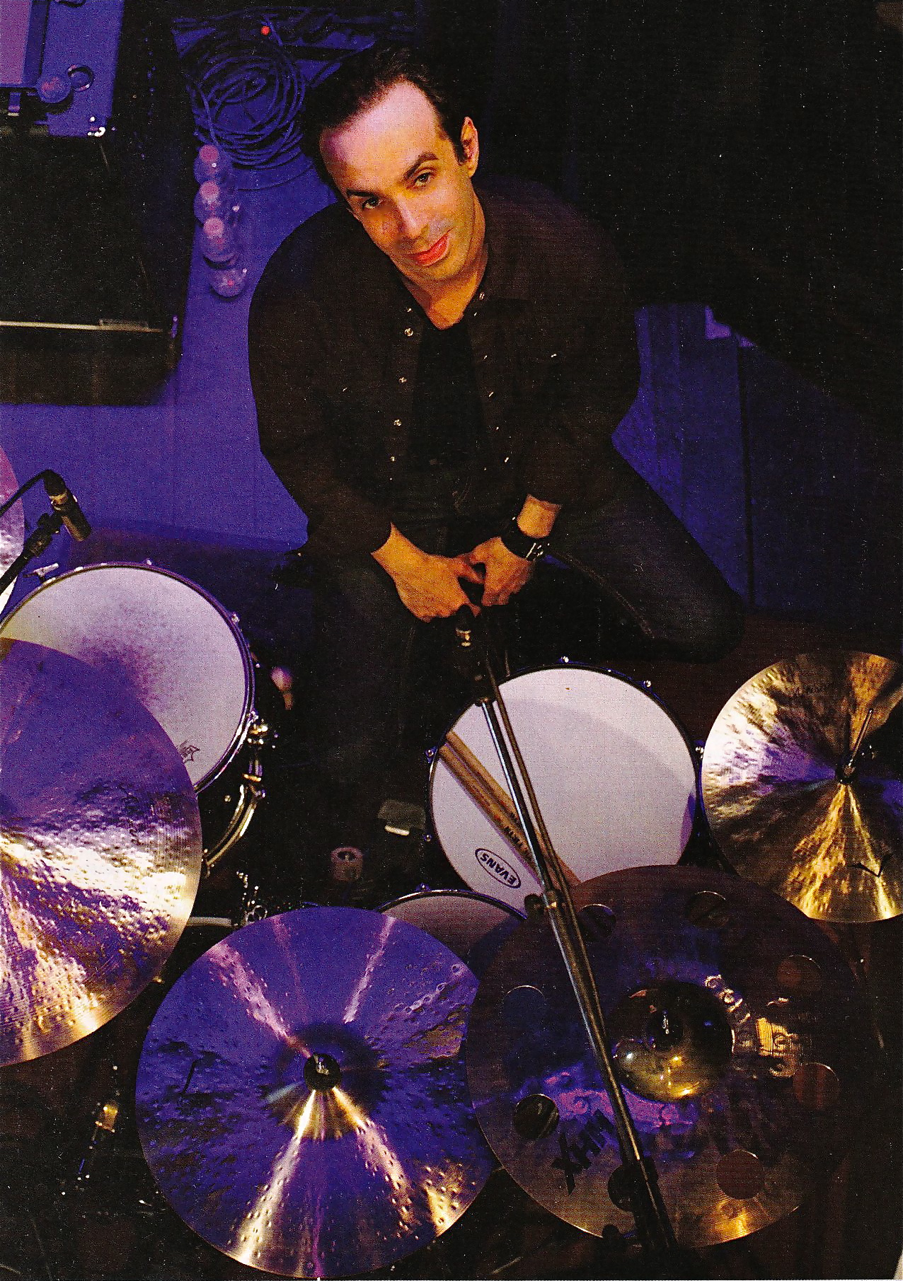 Benjamin Henocq à la batterie